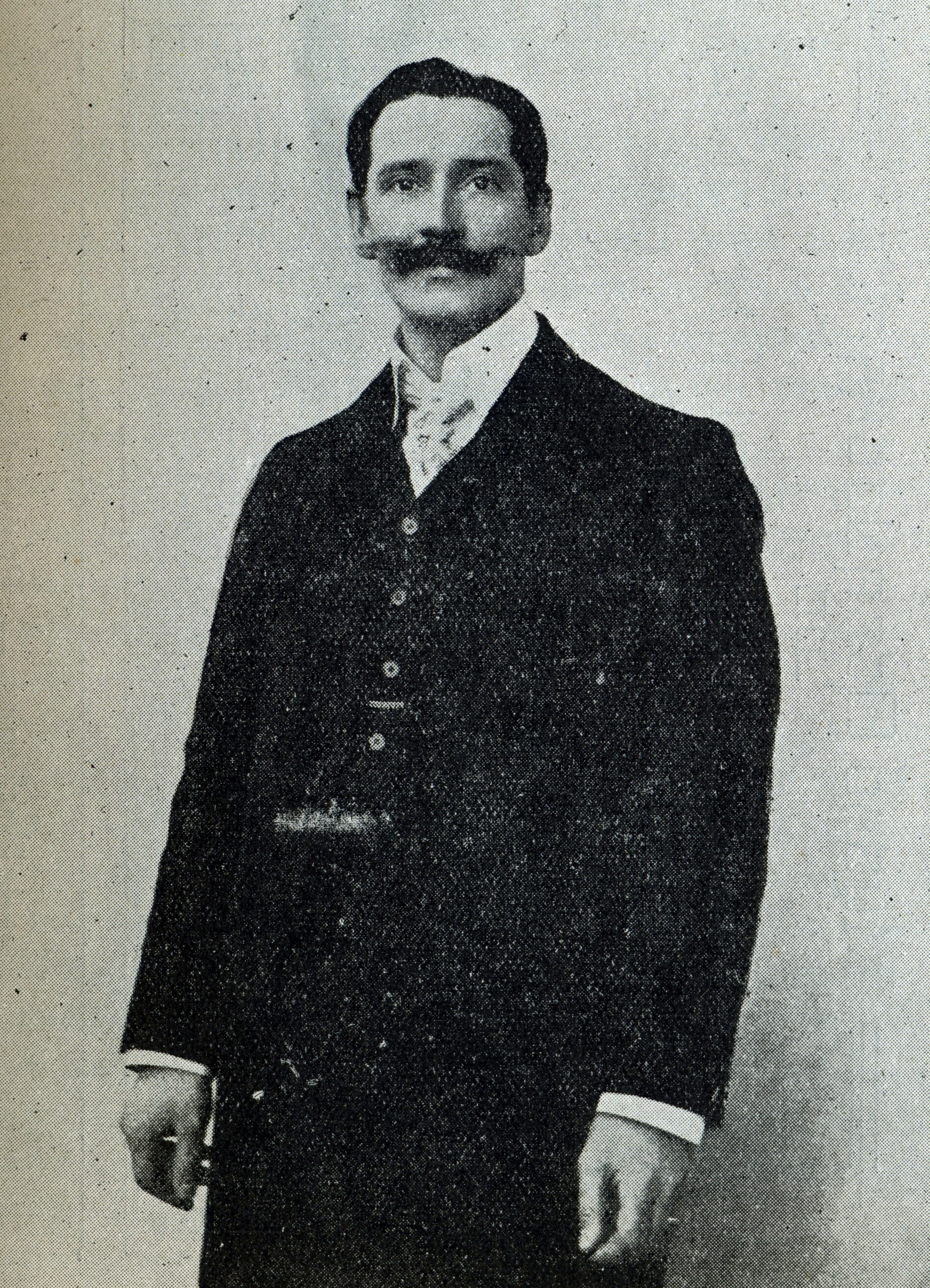 Eduardo Moore Bravo, Director del Museo Nacional de Historia Natural entre 1910 y 1927